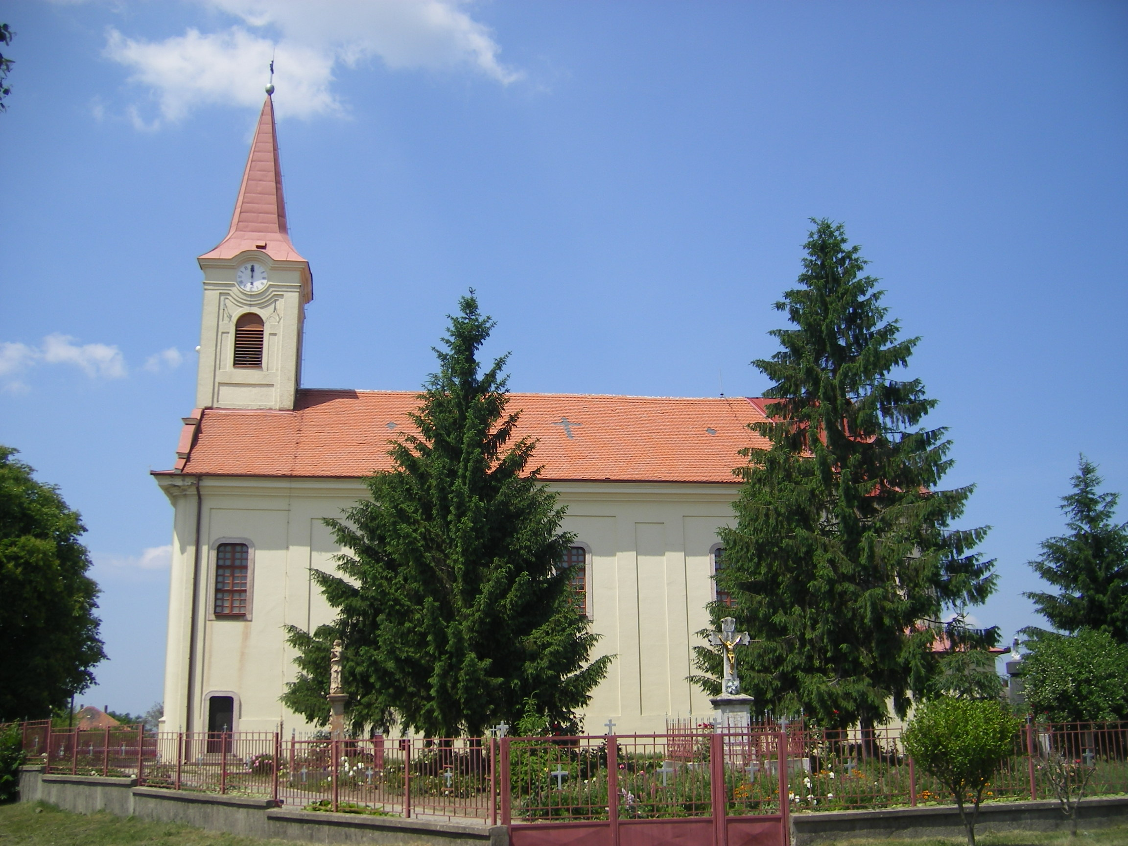 Perbete